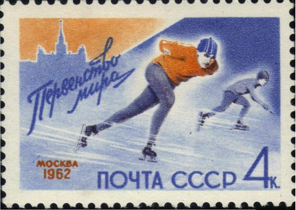 Почтовая марка СССР, посвященная чемпионату мира по конькобежному спорту 1962 года в Москве